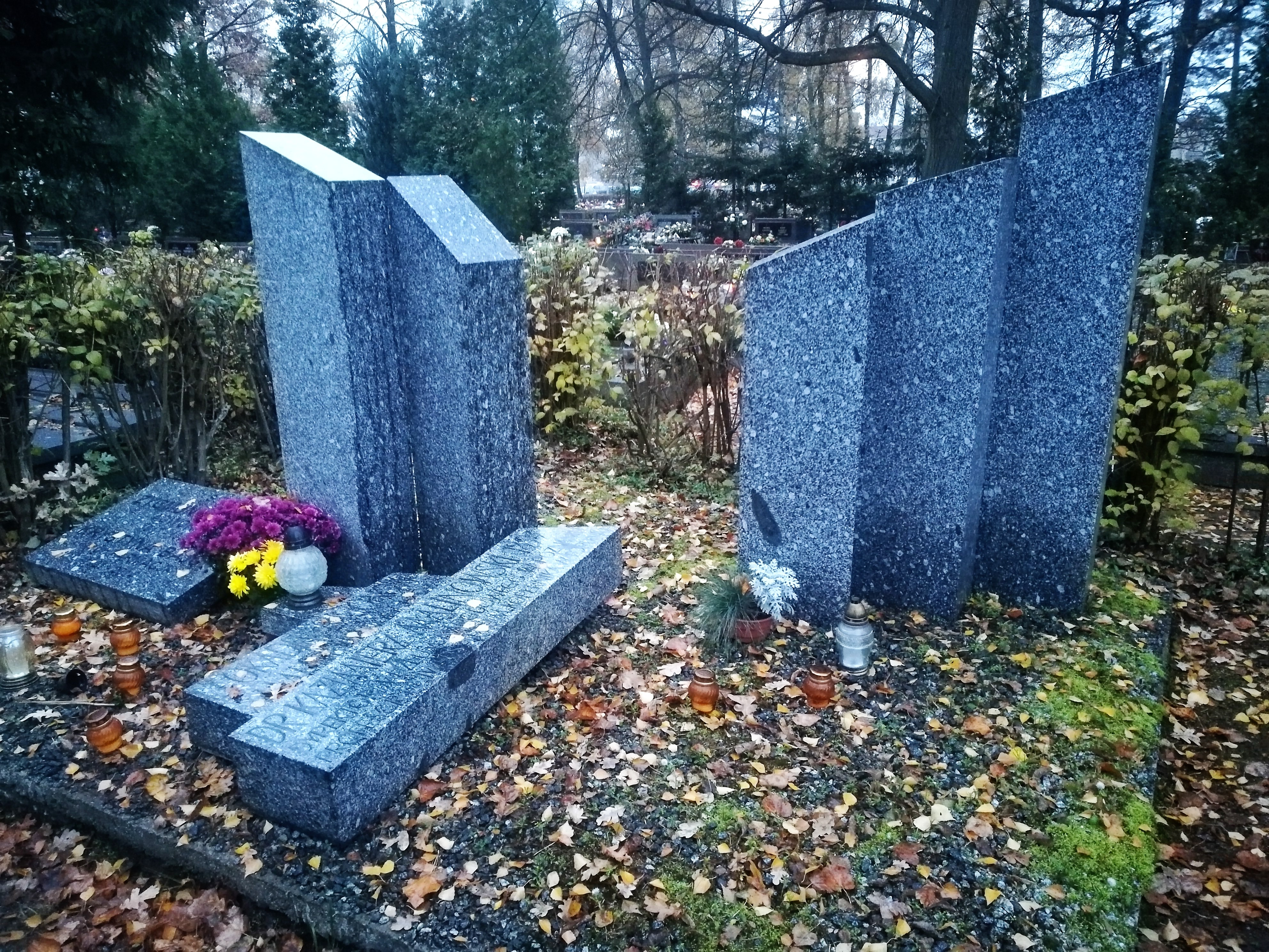 Grób Kazimierza Malinowskiego na cm. Junikowo w Poznaniu.